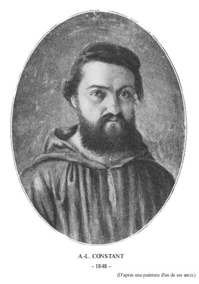 Eliphas Lévi en 1848